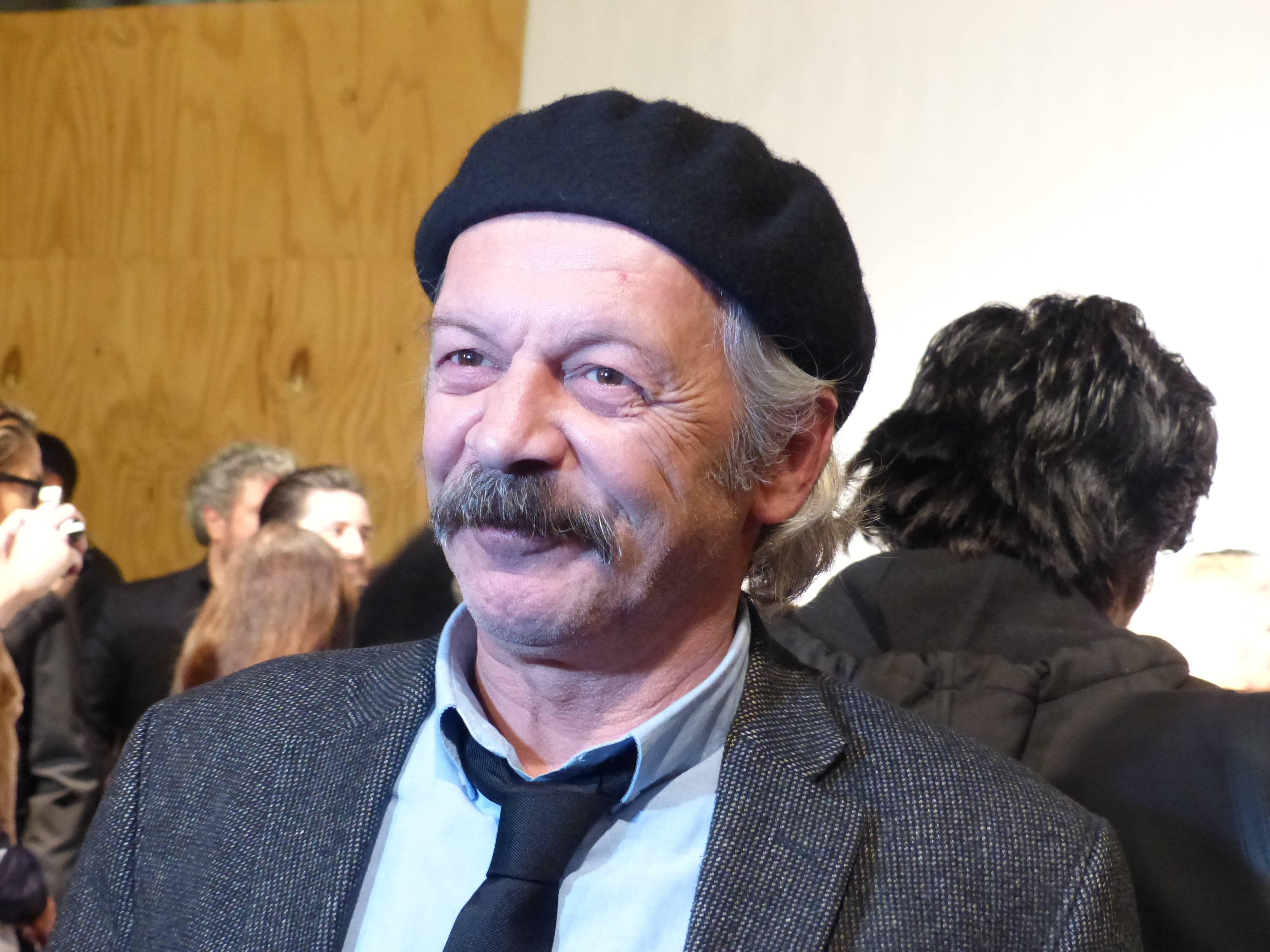 Vedat Erincin bei der Premiere von "300 Worte Deutsch", Januar 2015.